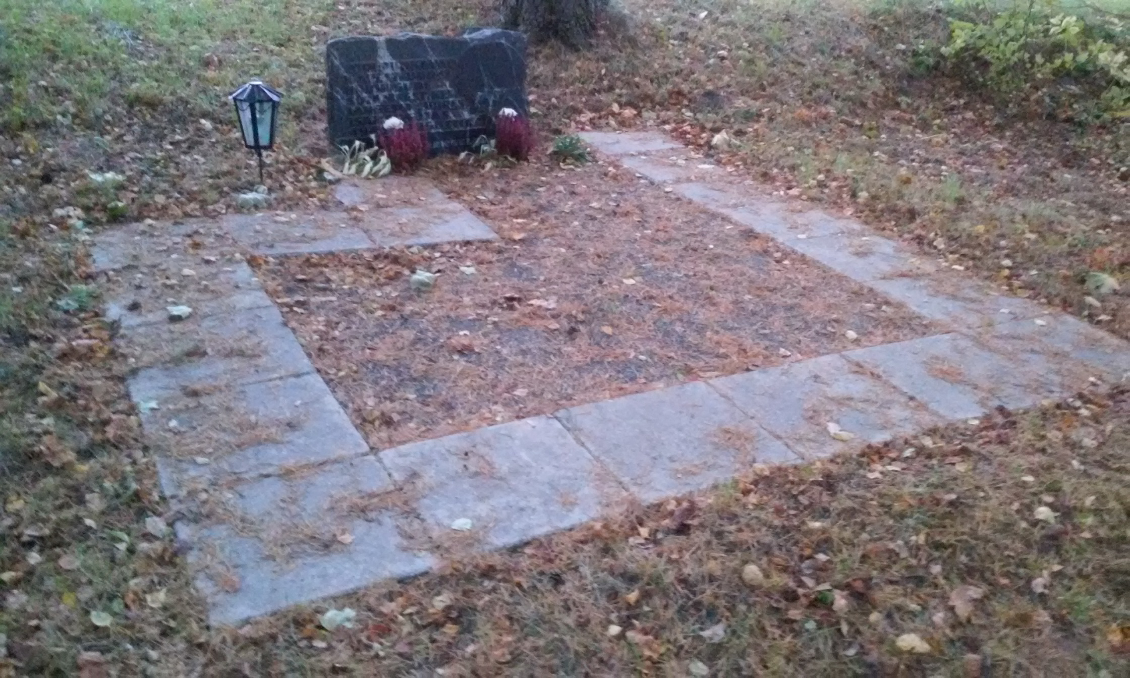 Üldvaade